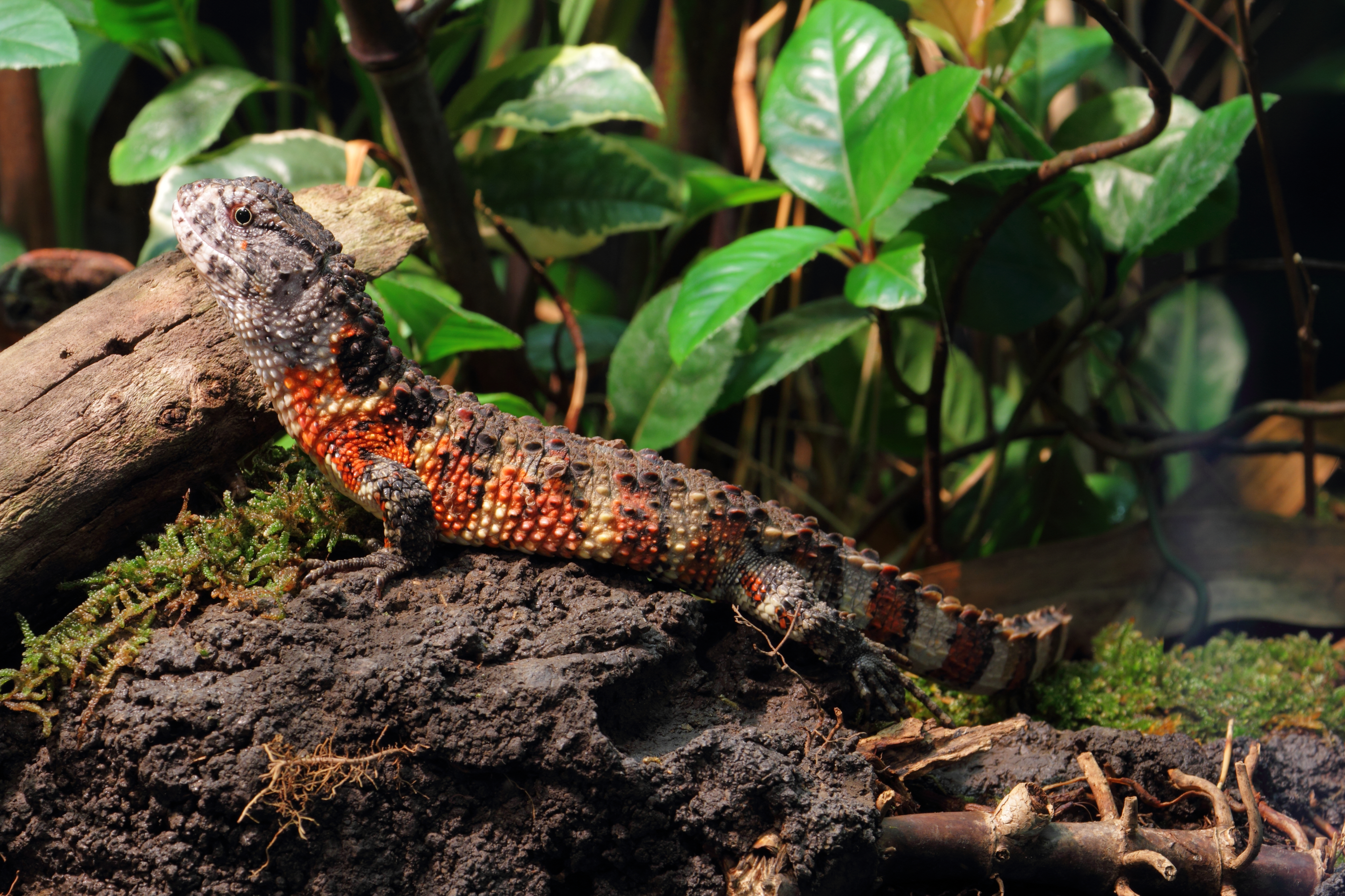 Chinesische Krokodilschwanzechse Shinisaurus crocodilurus im Tiergarten Schönbrunn.